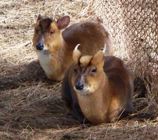 Мунтжаки в бакинском зоопарке